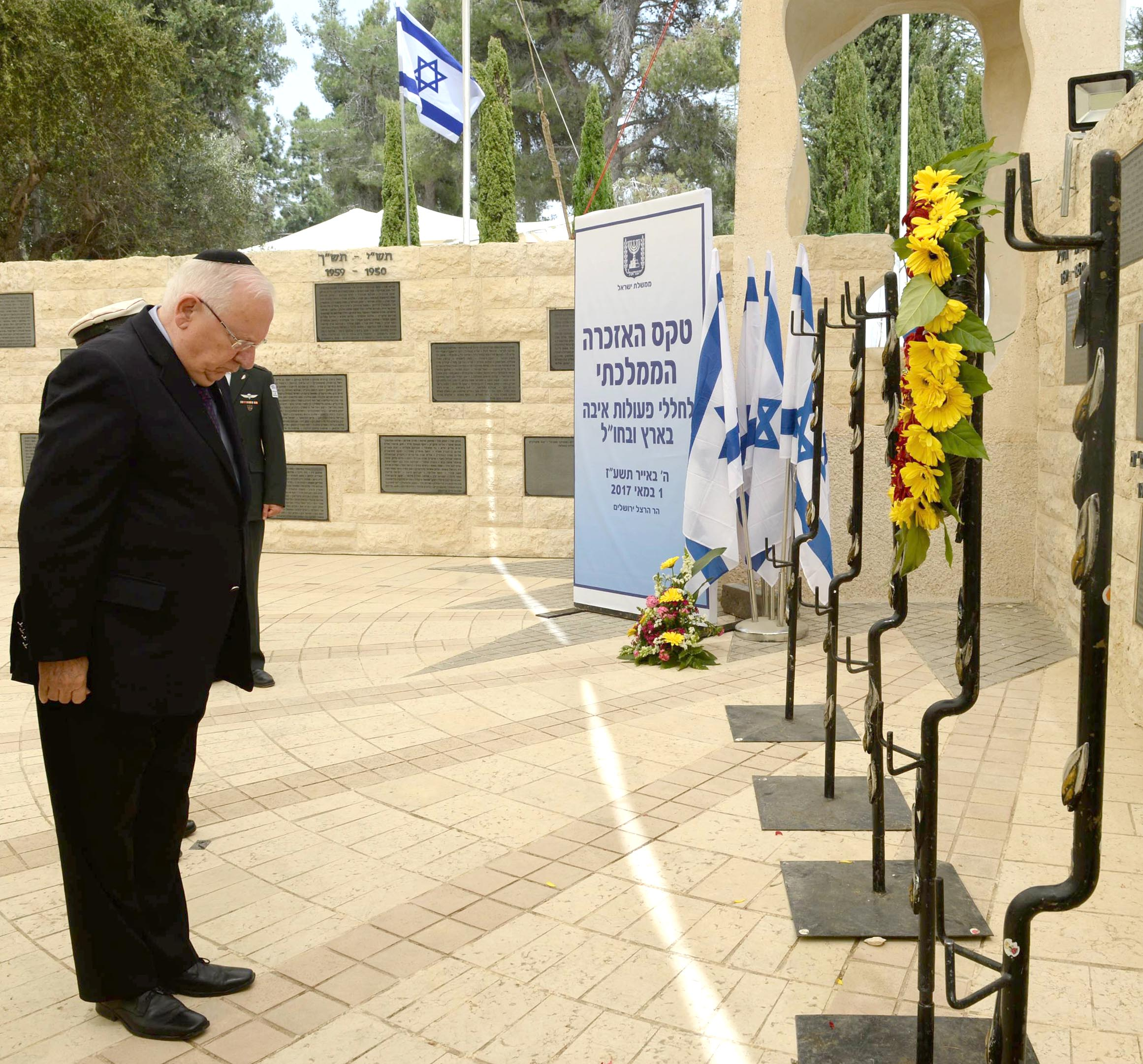 נשיא מדינת ישראל ראובן ריבלין בטקס אזכרה ממלכתי בישראל לנפגעי פעולות איבה 2017